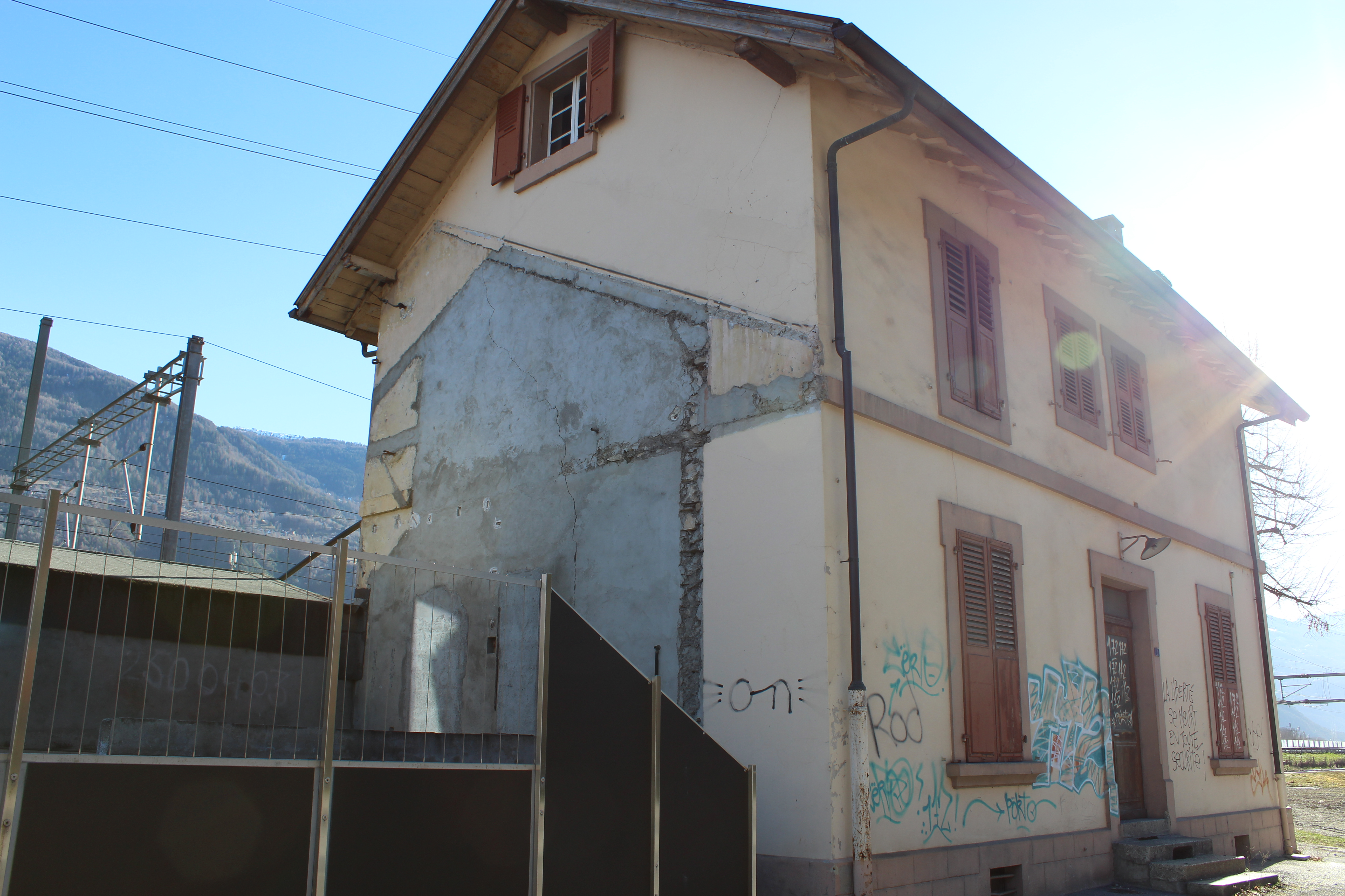 Bâtiment voyageurs de la gare de Granges-Lens à l'abandon